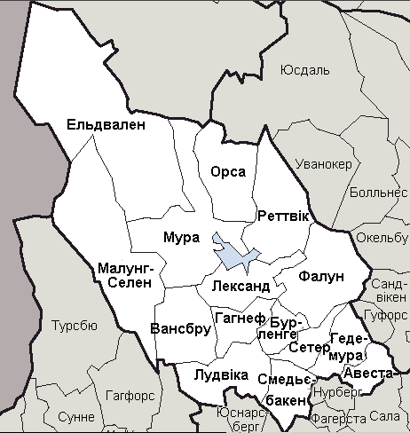 Карта адміністративного поділу лену Даларна у Швеції. Карту створено на основі карти File:Dalarna County.png.